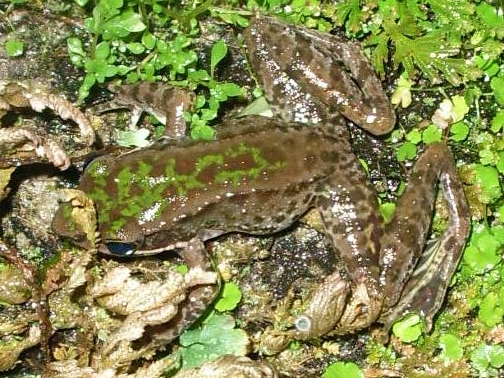 斯文豪氏赤蛙，學名:Odorrana swinhoana，(Boulenger, 1903)， 同種異名：Rana swinhoana，拍攝地點：臺北木柵指南山。